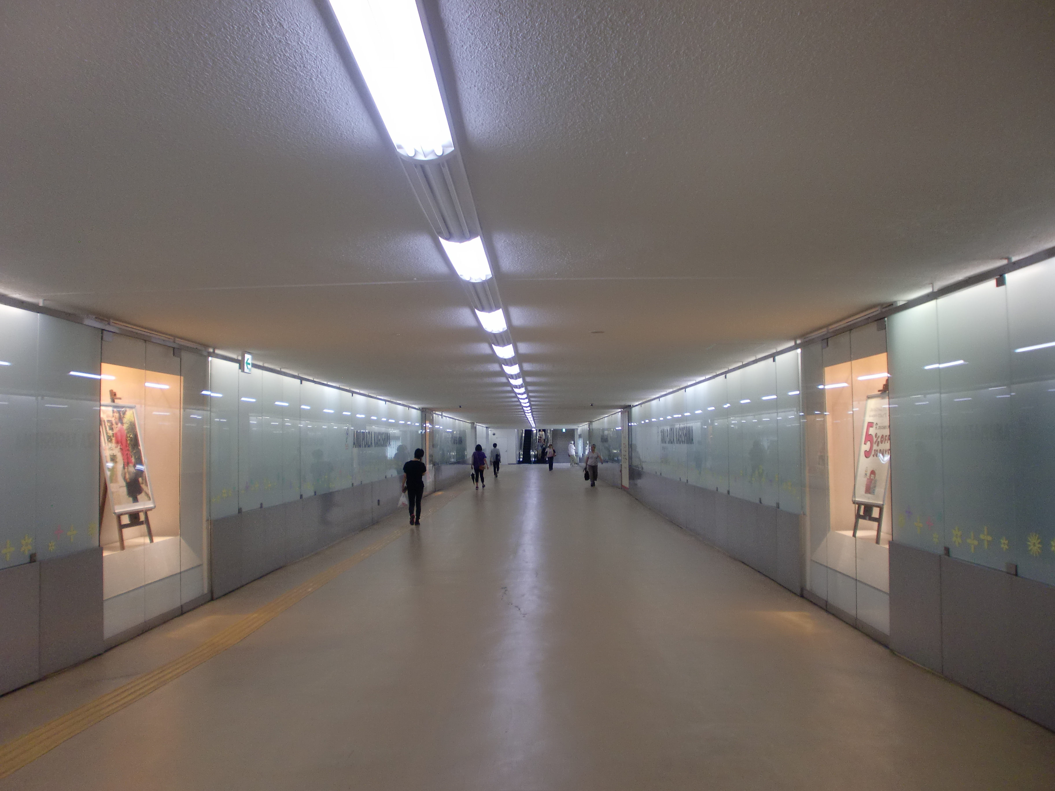 鹿児島中央駅の西口と東口を結ぶ通路。西鹿児島駅時代はこの通路はホーム連絡通路として使用されており、壁にショーケースが設置されている部分が以前はホームへの階段であった。